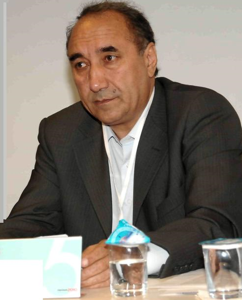 Ali Şamil